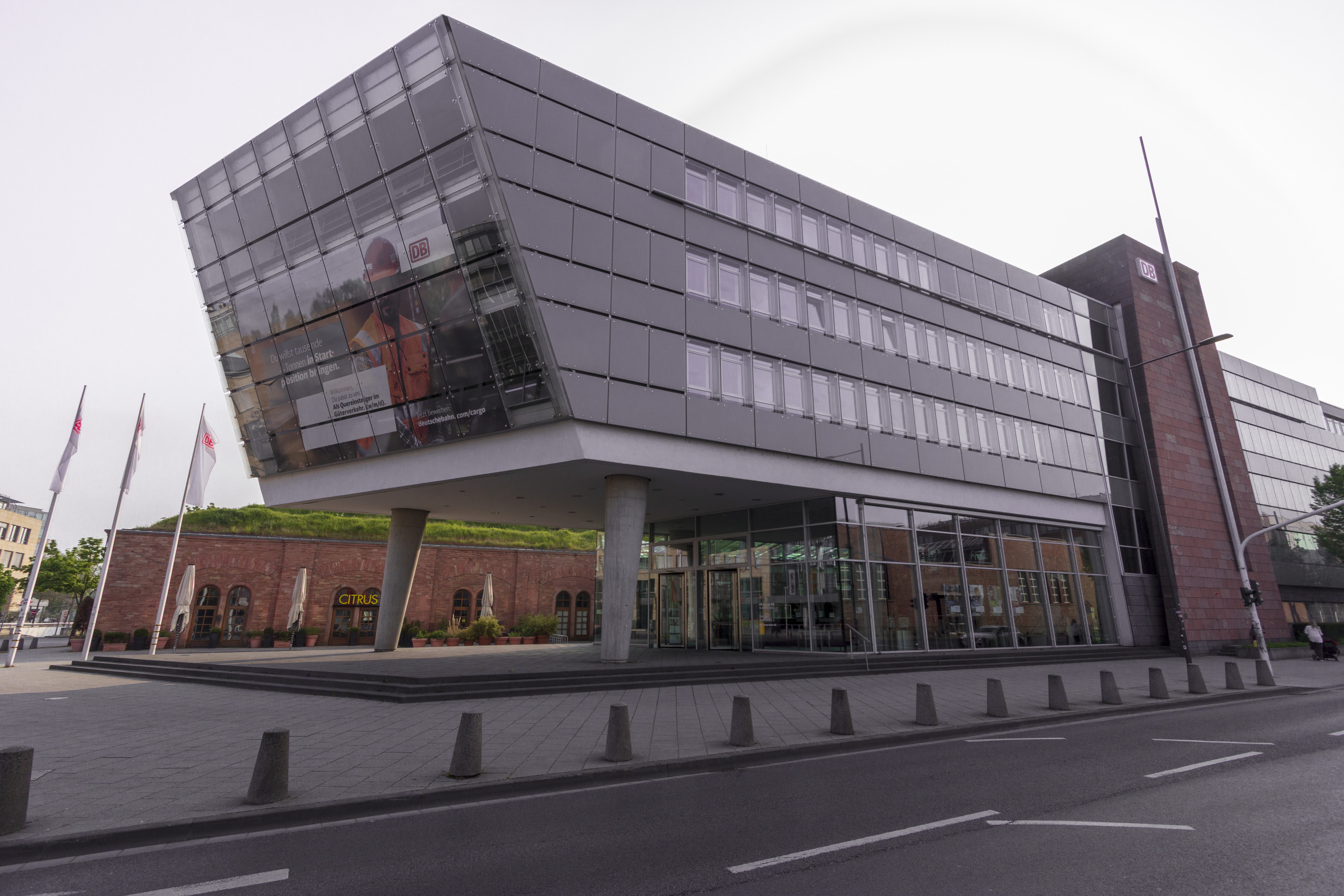 Ansichten in Mainz während der COVID-19 Pandemie.